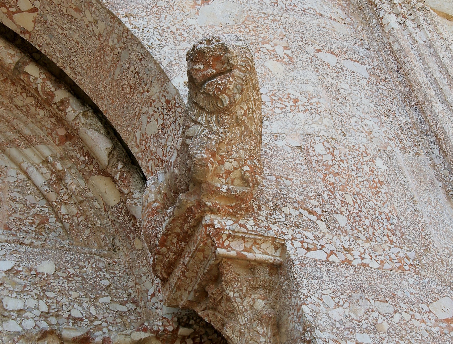 Entrance